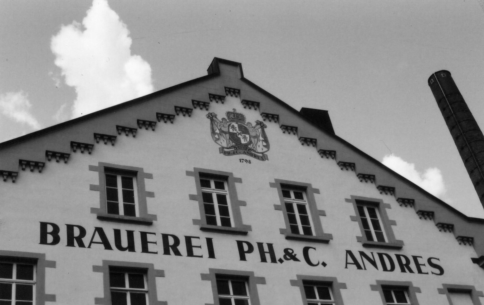 Brauerei Andres (Kirner Pils), Kallenfelser Straße, Kirn